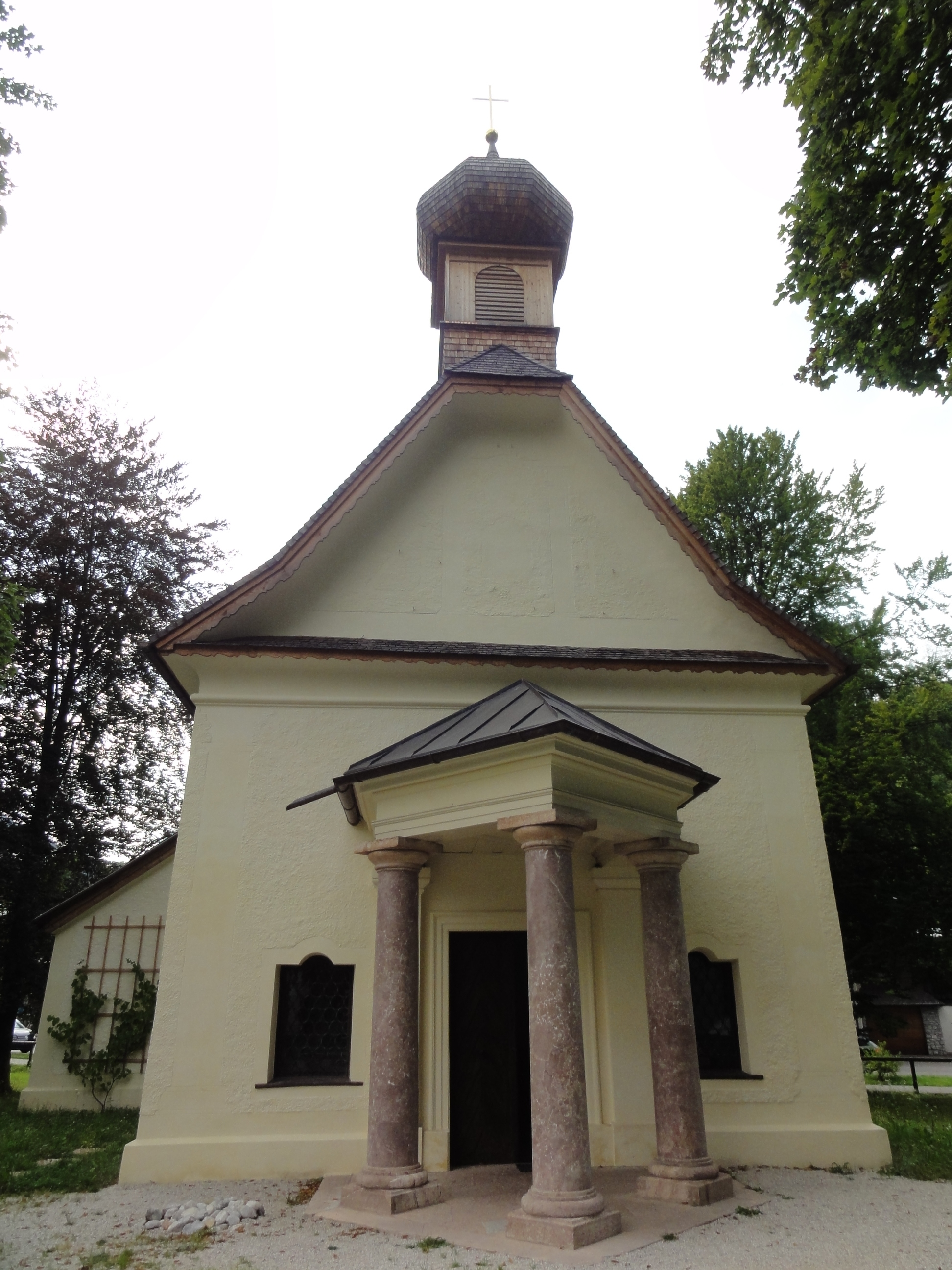 Germany, Bayern, Schönau am Königssee